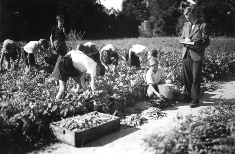 Berlin-Blankenfelde, im Schulgarten Illus-Bittner Arbeitsgarten [Berlin-] Blankenfelde 23.8.1947 Ernte ("Ohne Fleiss keinen Preis") 791-47